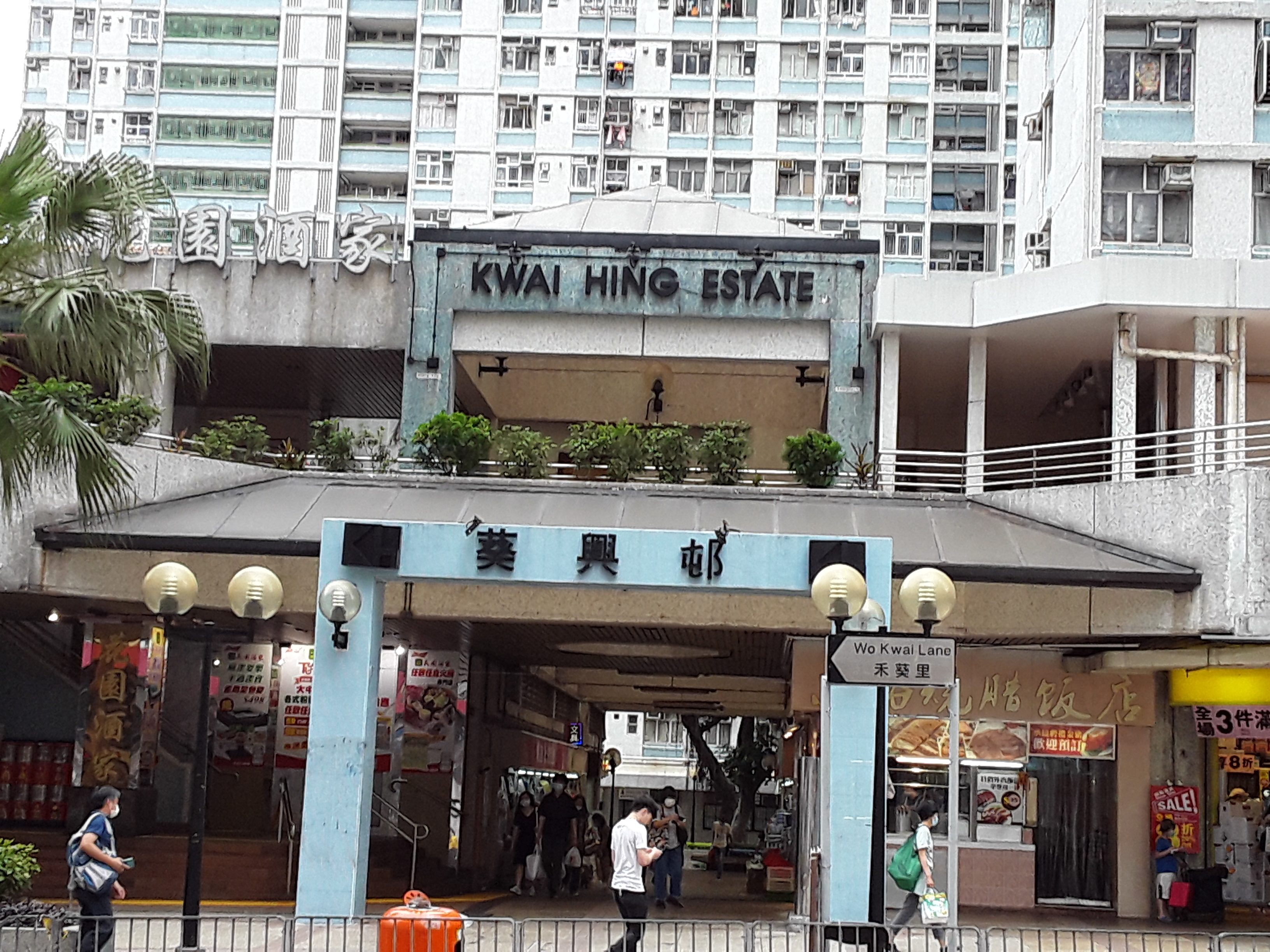 葵興邨與禾葵里